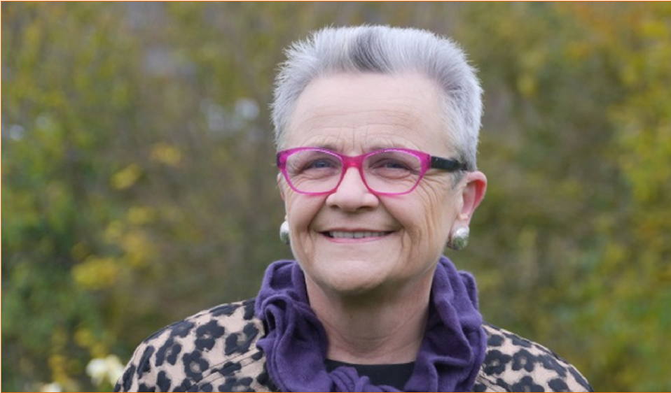 Portrait de Françoise Gatel, sénateur-maire de Châteaugiron.